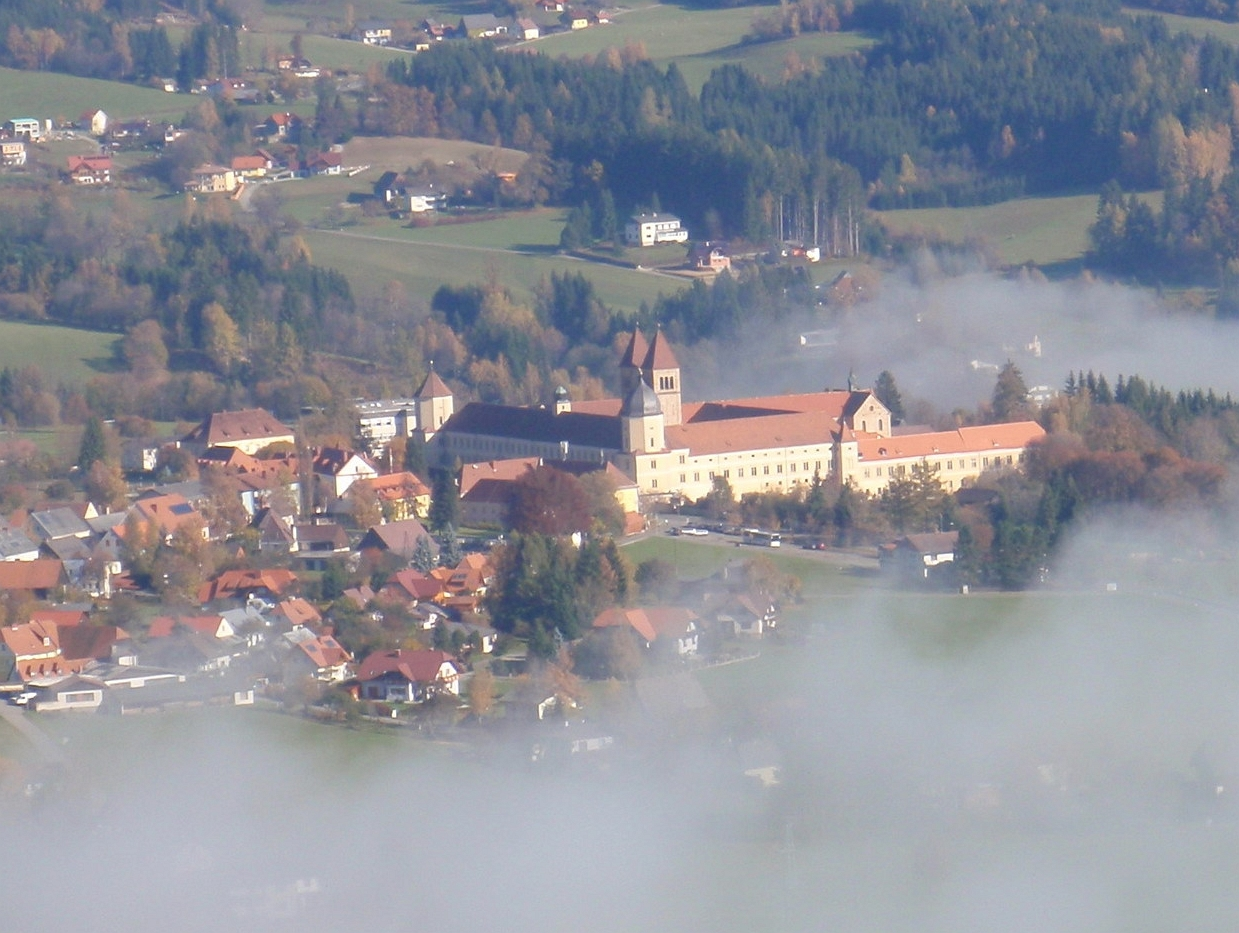 Marktgemeinde Seckau mit Benediktinerabtei; eigene Aufnahme des Autors